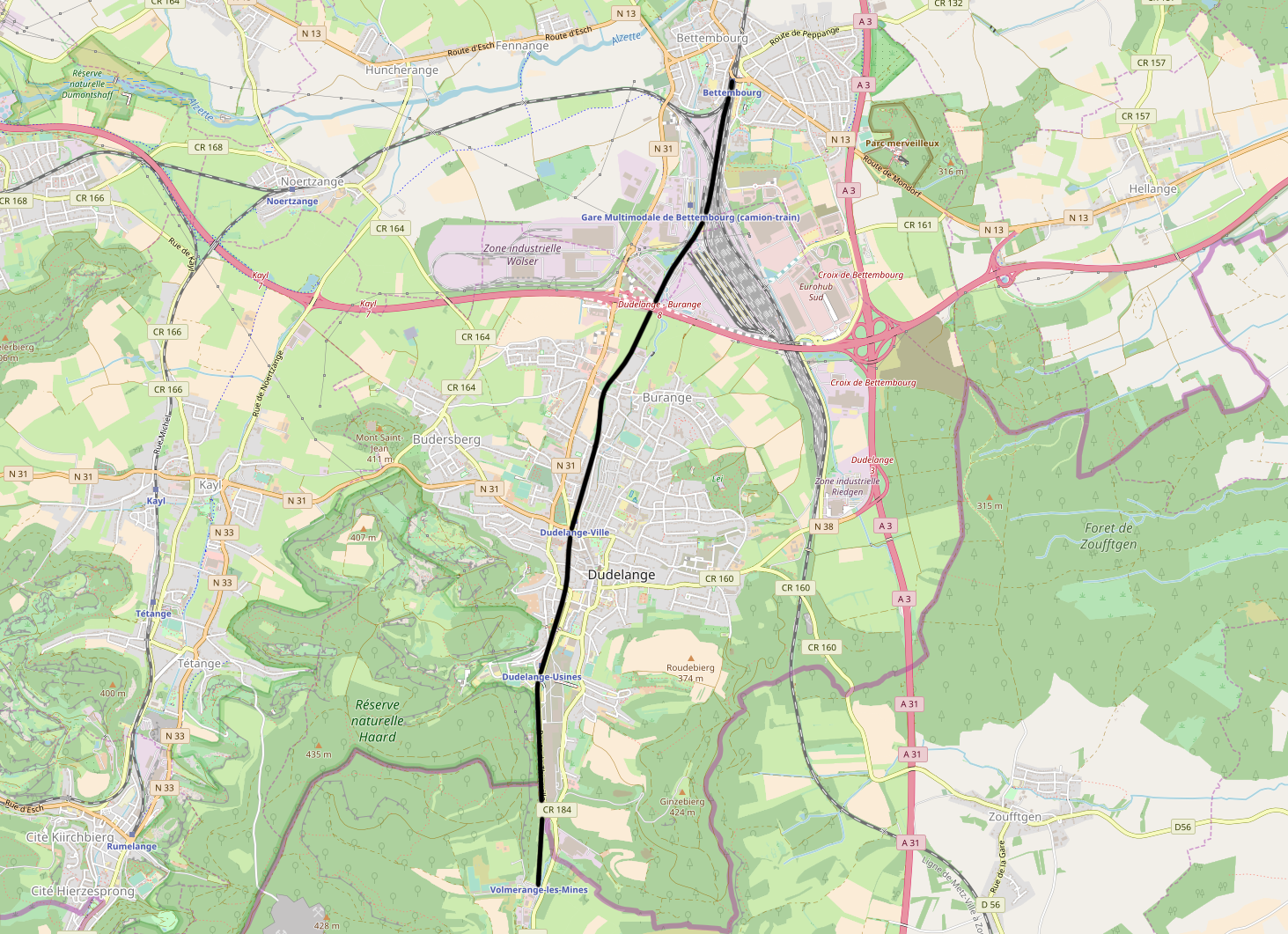 CFL line 6b, Bettembourg - Volmerange-les-Mines